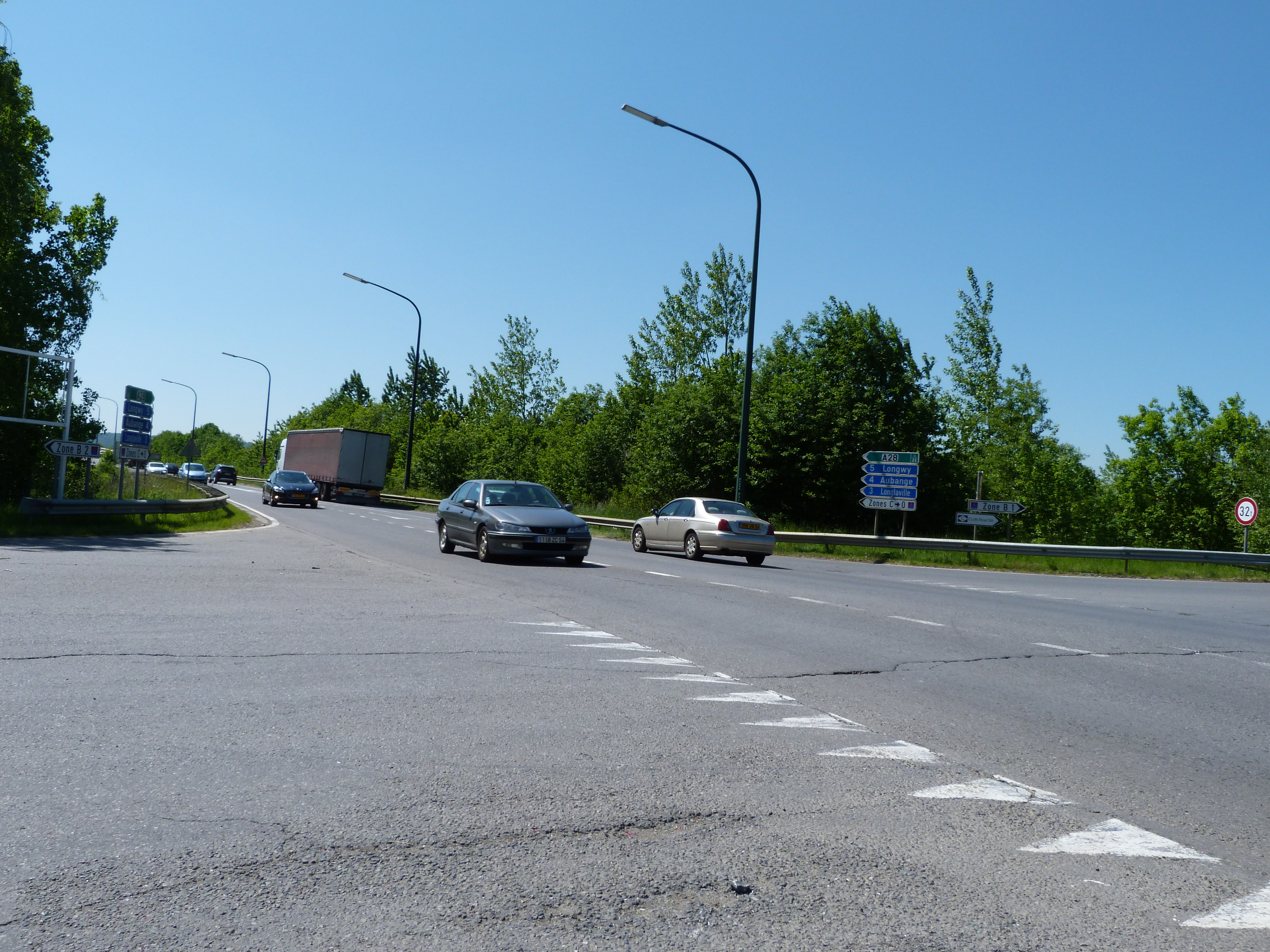 La route nationale belge 830 en 2013 à Athus